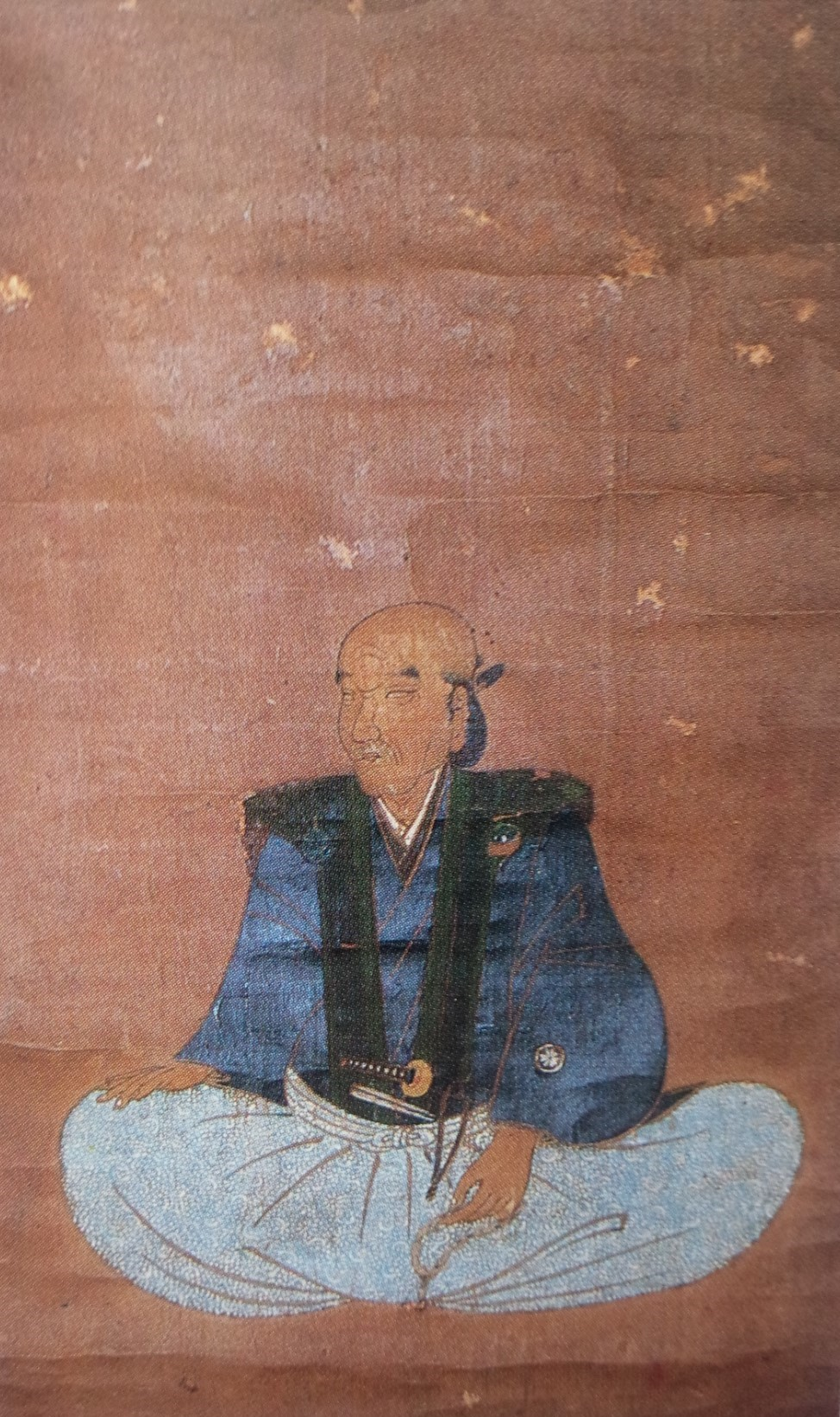 庄内藩主・酒井忠勝の肖像。